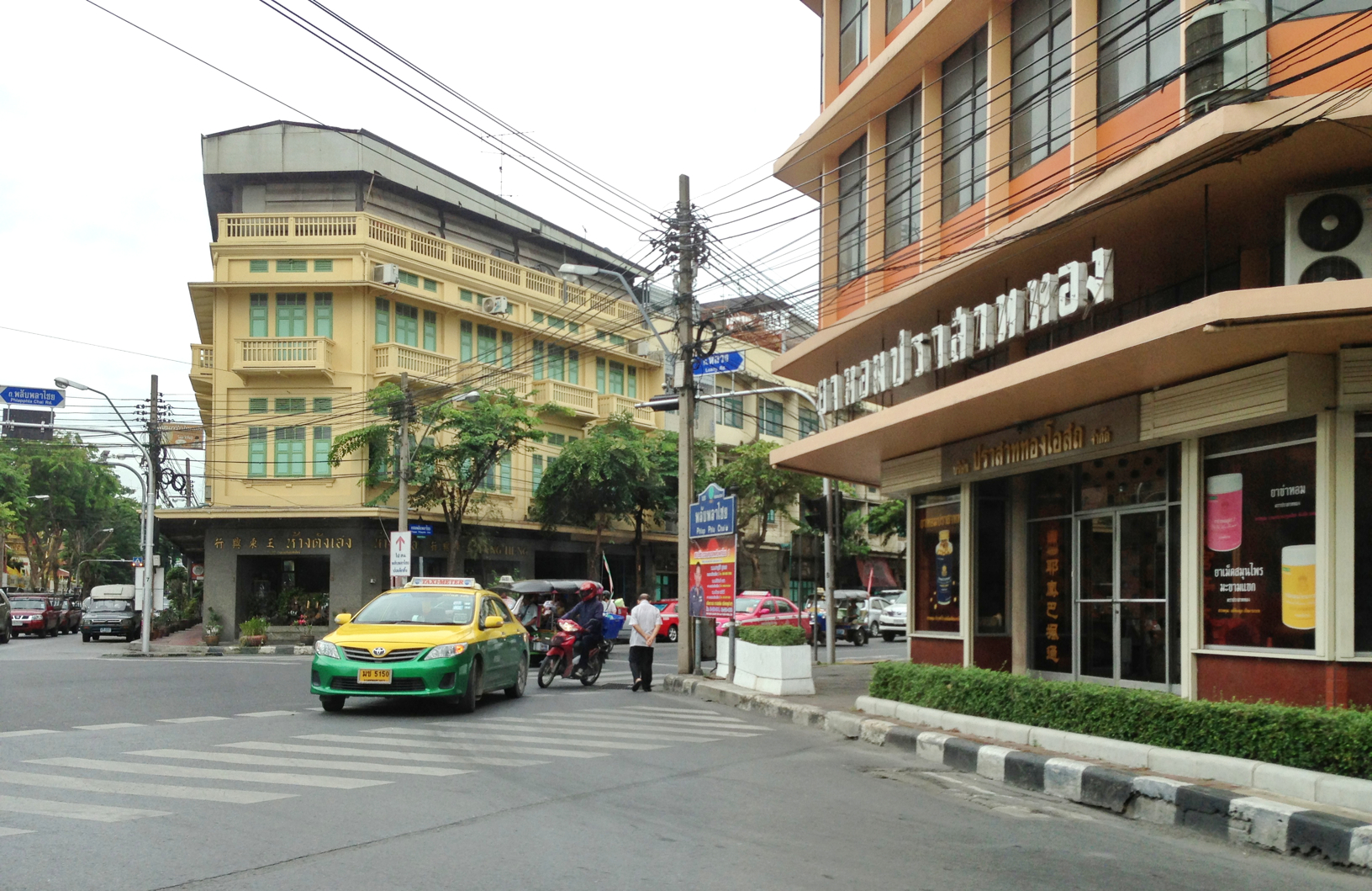 Luang, wat Thepsirin, Pom Prap Sattru Phai, bangkok